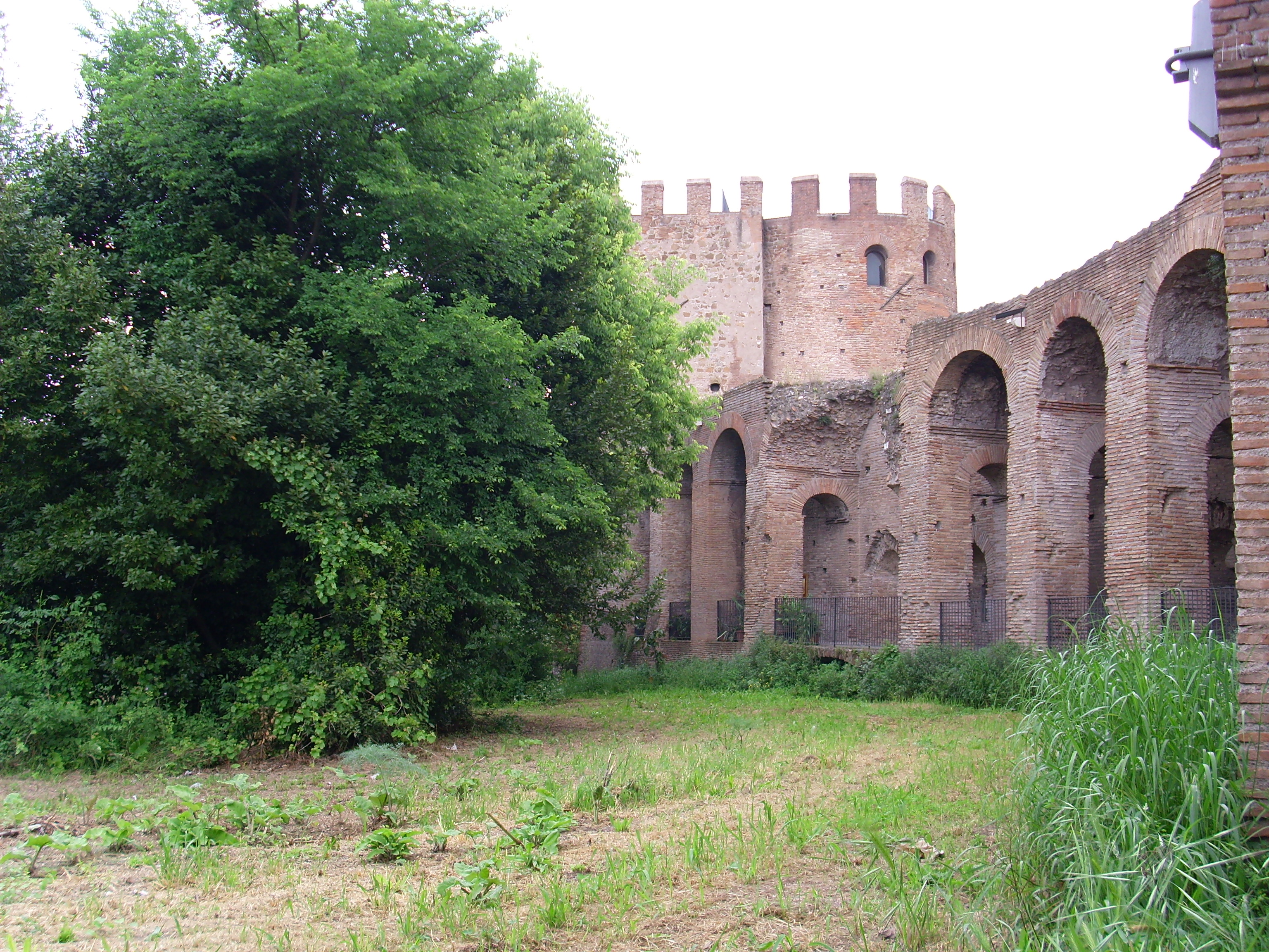 tratto di Mura Aureliane vicino Porta San Sebastiano